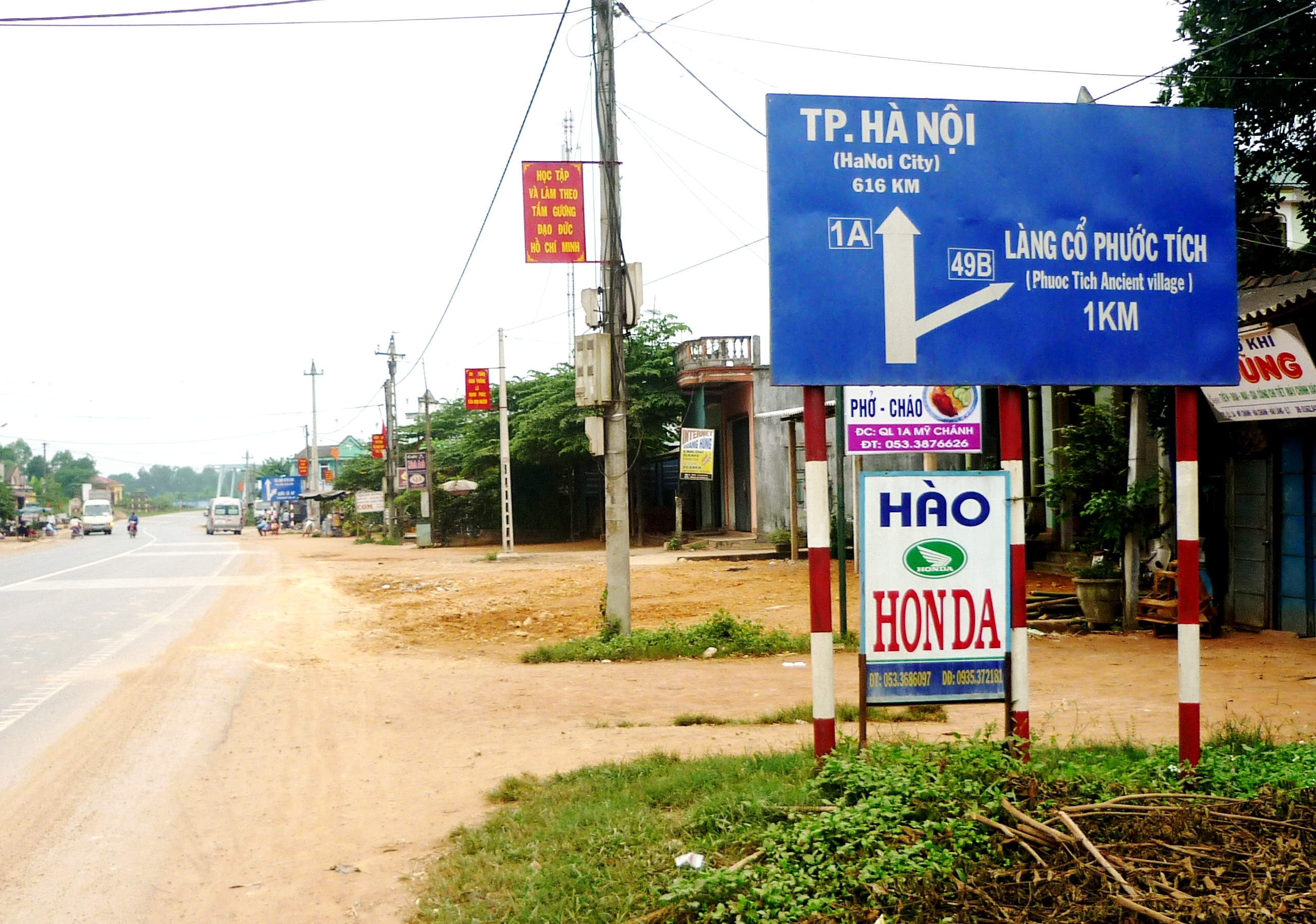 Biển chỉ dẫn đường vào làng Phước Tích